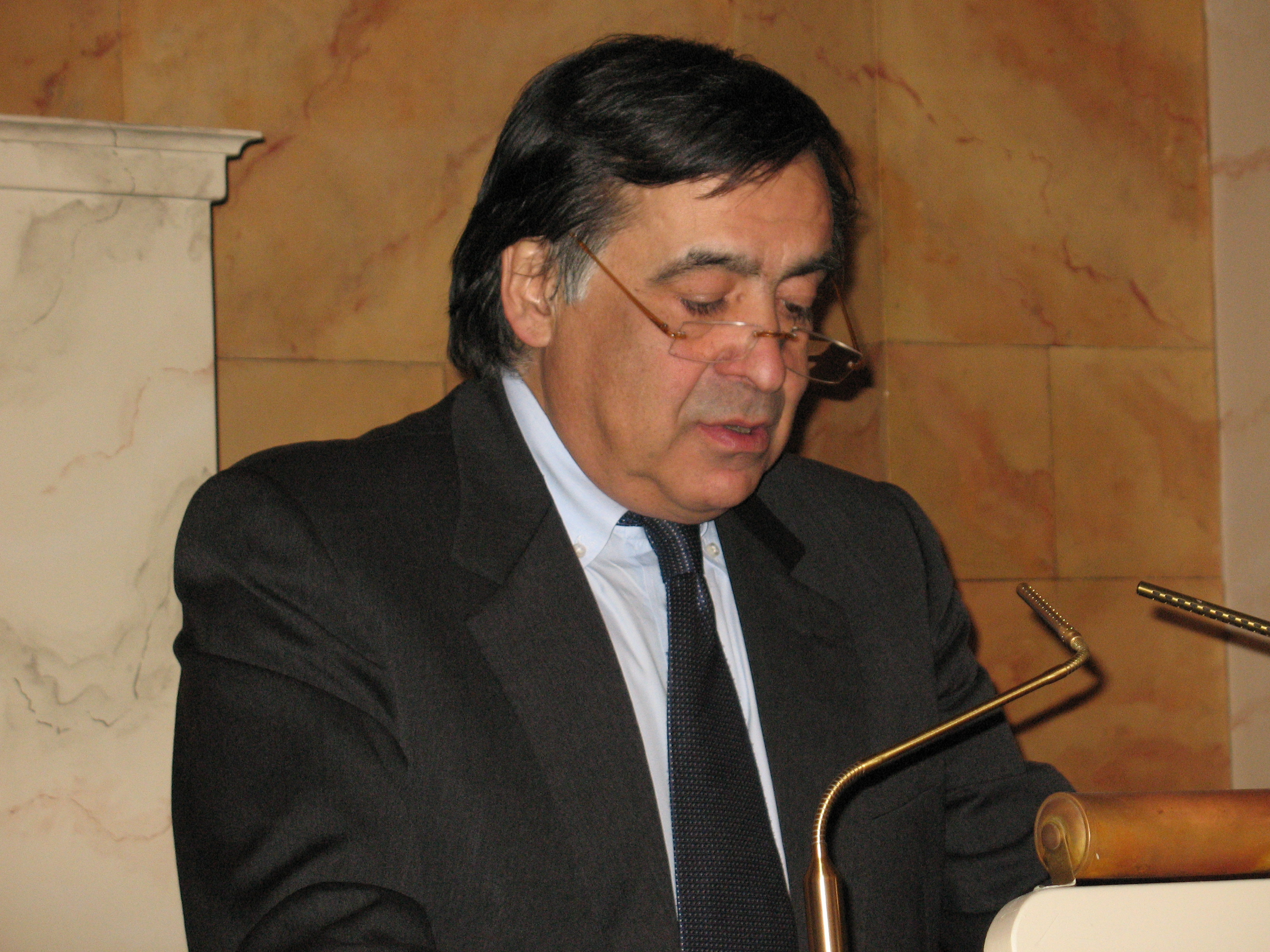 Prof. Dr. Leoluca Orlando bei der Verleihung des Humanismus-Preises im Rahmen des Bundeskongresses des DAV 2008 in der alten Aula der Universität Göttingen.